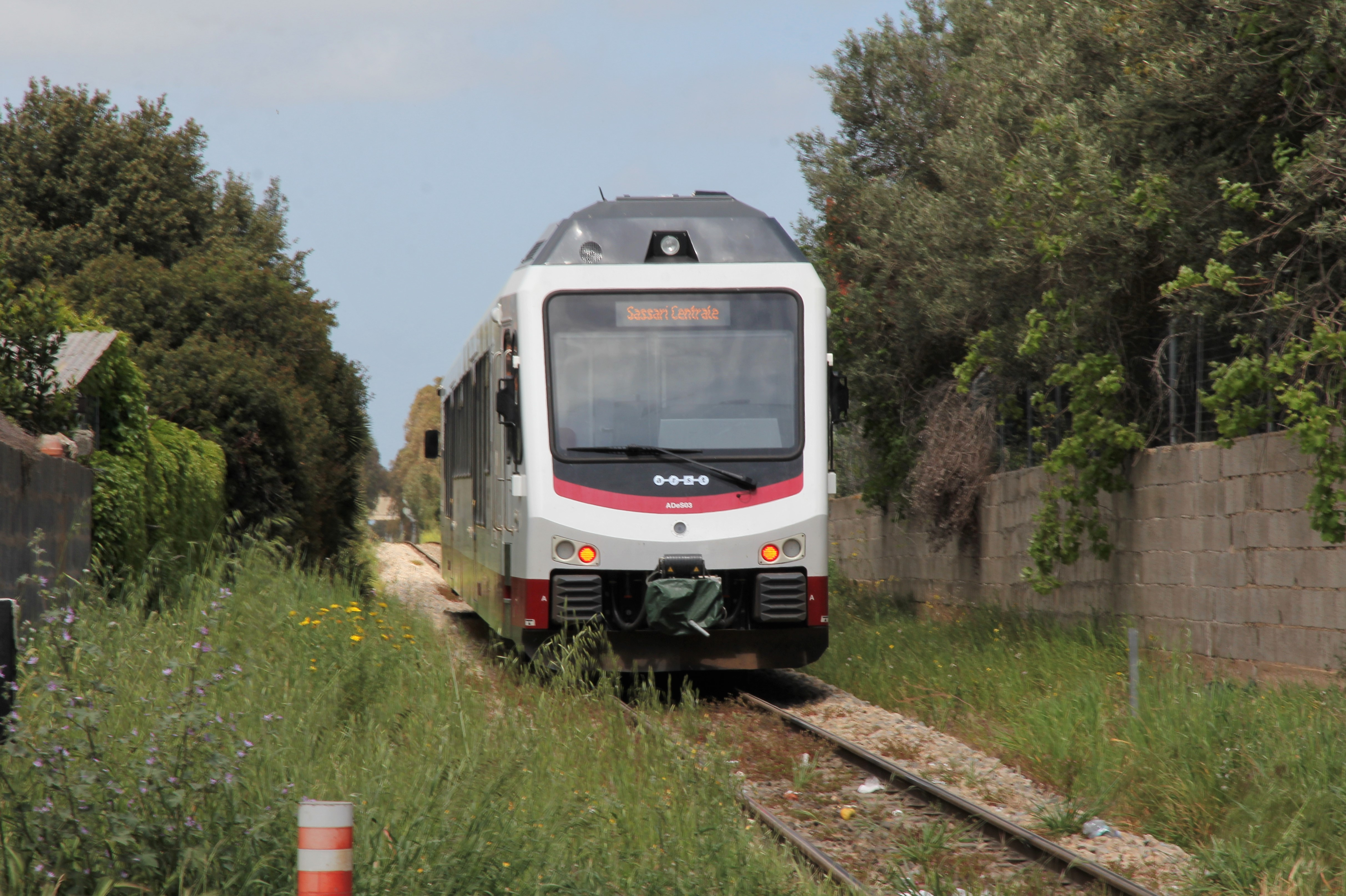 Automotrice ARST ADeS 01–04 ad Olmedo